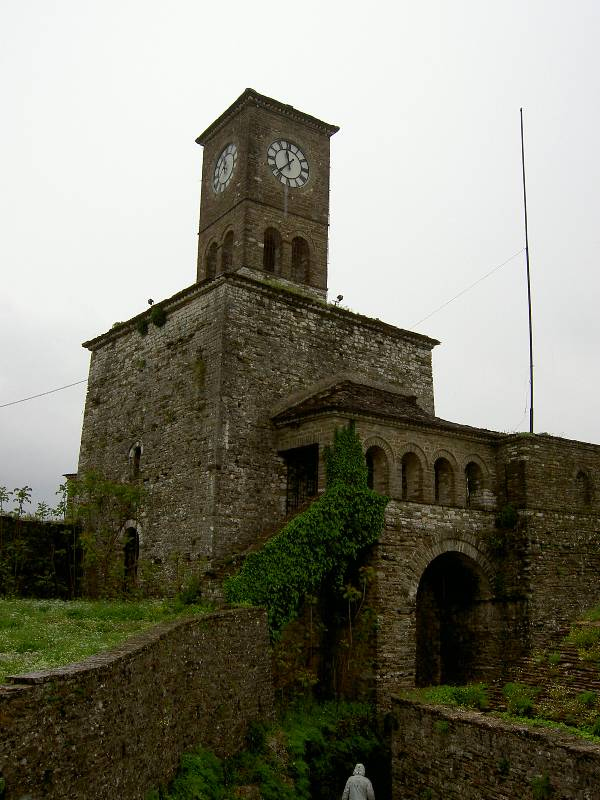 Citadel of Gjirokasta. Photo joonas lyytinen